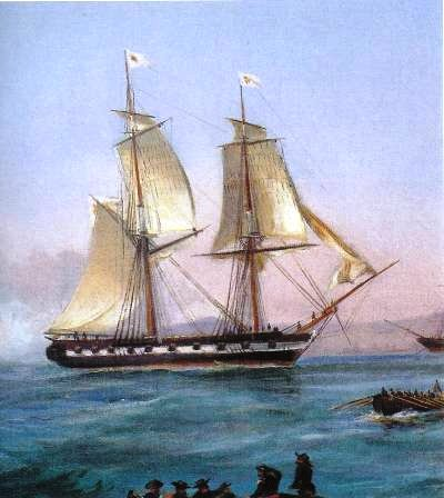 Il brigantino del regno delle due Sicilie Principe Carlo, poi italiano Tronto (l’identificazione come Zeffiro è errata) durante il bombardamento di Tunisi, nel marzo 1833